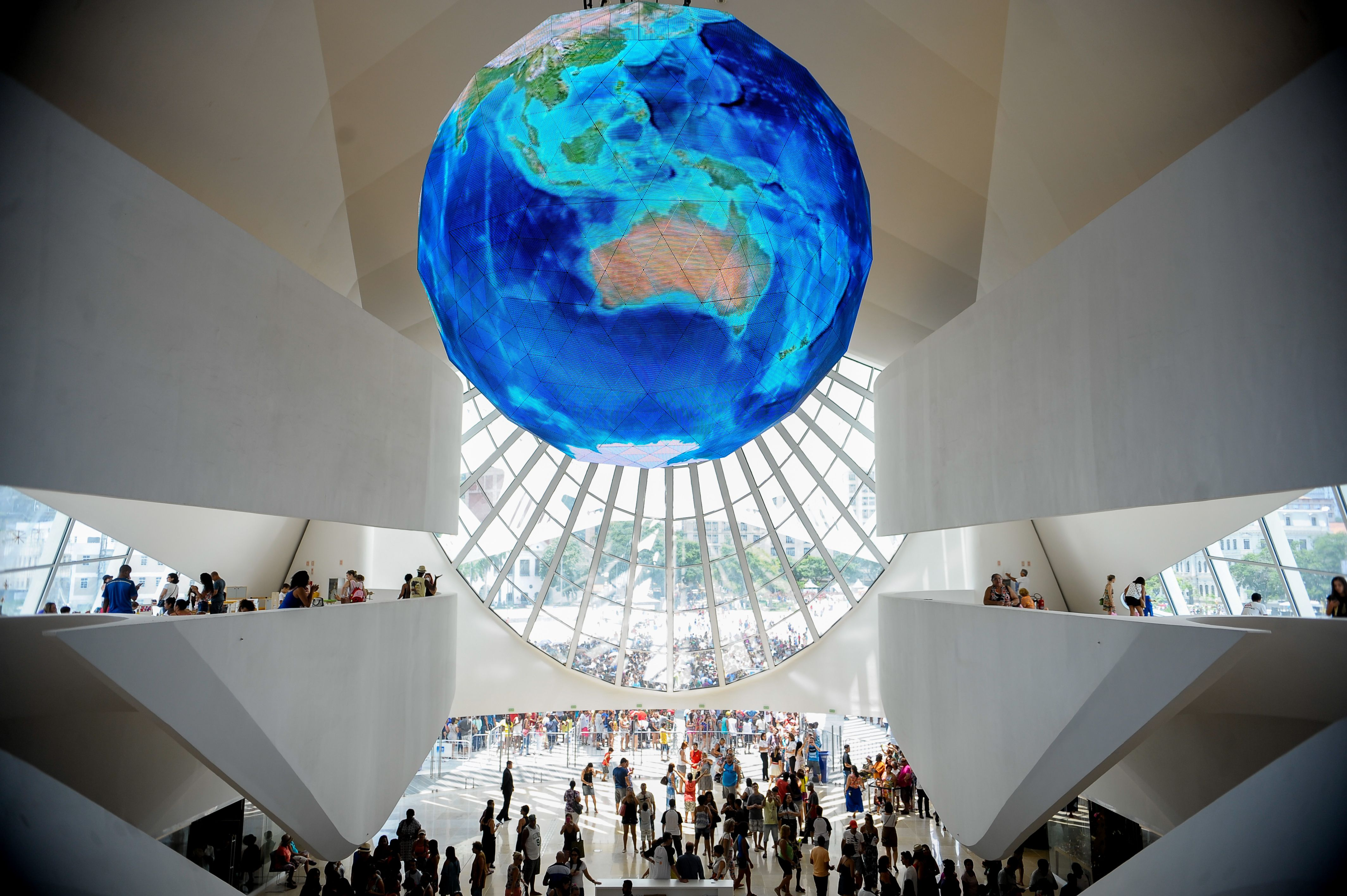 Rio de Janeiro - Para celebrar a inauguração do Museu do Amanhã, na Praça Mauá, aberto pela primeira vez ao público neste fim de semana, a Prefeitura do Rio realiza o Viradão do Amanhã